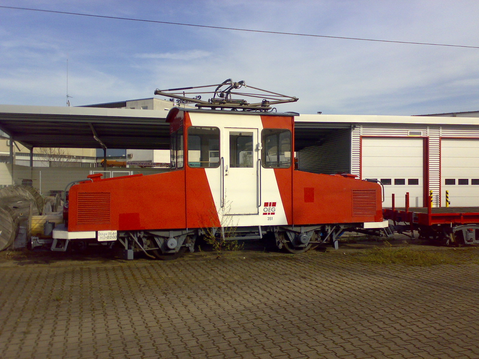 OEG 351 am 05.04.2007 in Mannheim Käfertal